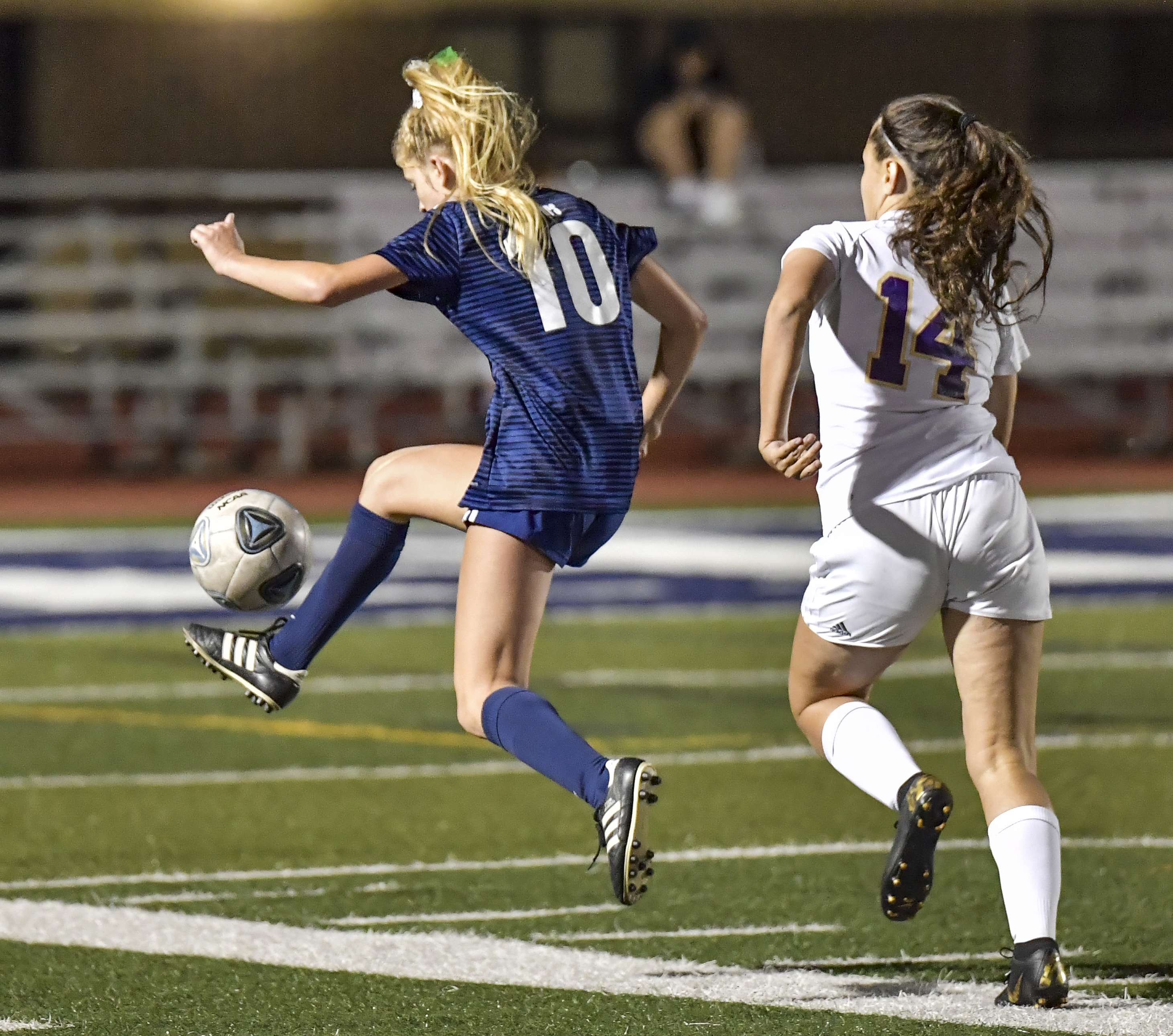 Hudson Lady Explorers vs North Royalton